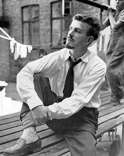 Bo Widerberg